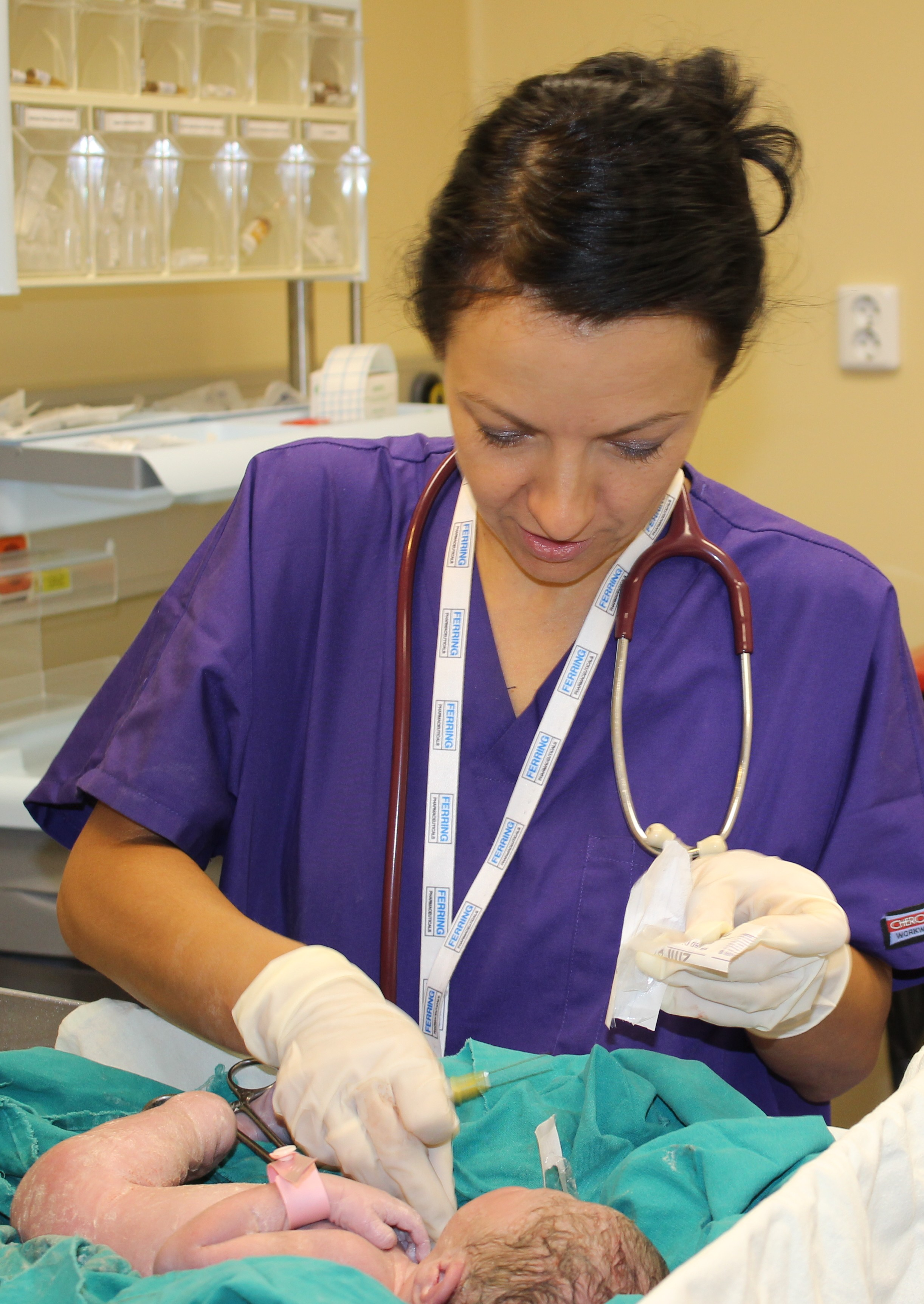 Родилно отделение